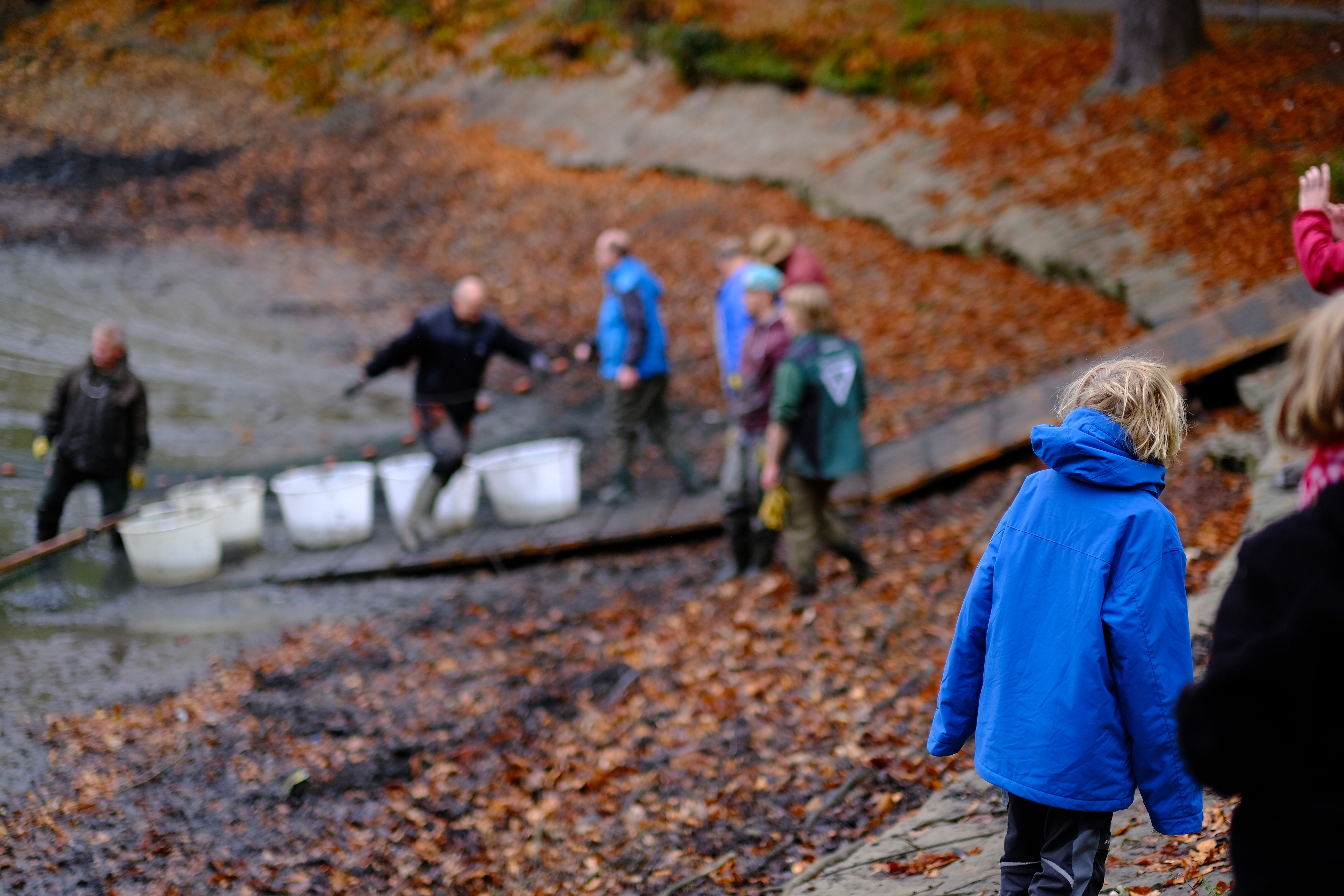 Tübingen. Aus dem Anlagensee wird Wasser für den Winter abgelassen und die Fische werden herausgeholt.